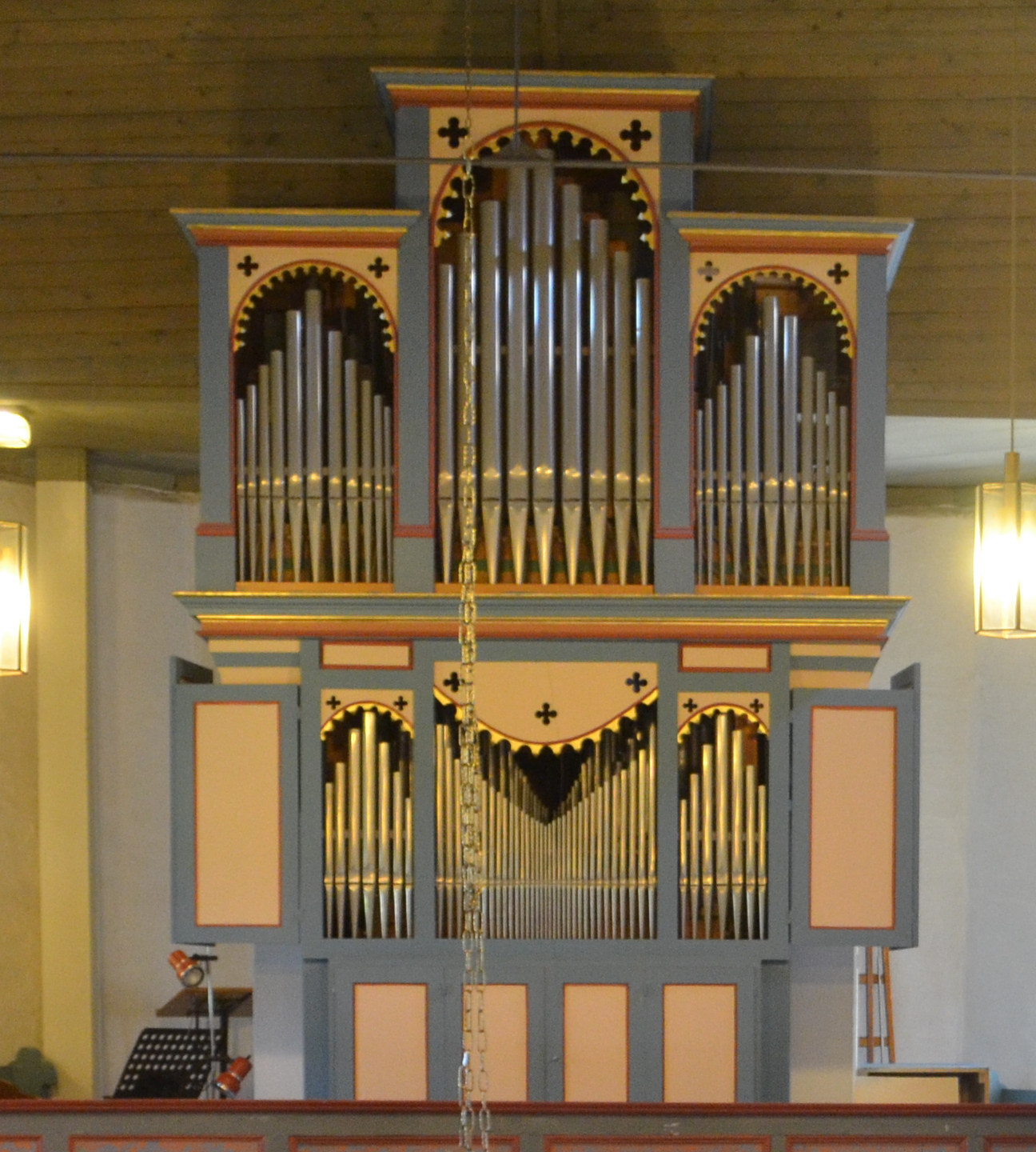 Arnoldshain, Laurentiuskirche, Orgel